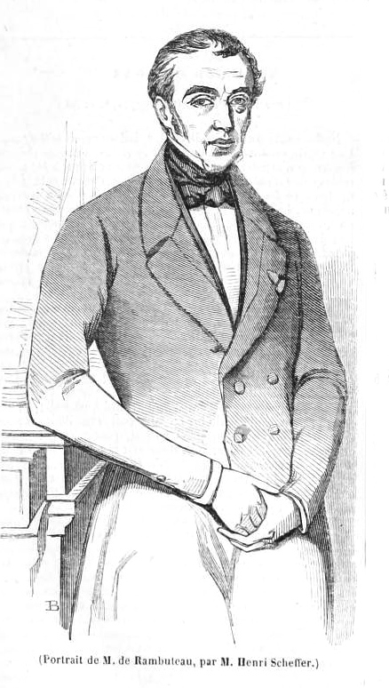 Claude-Philibert Barthelot, comte de Rambuteau (Mâcon, 9 November 1781 – Château de Rambuteau, 11 April 1869)